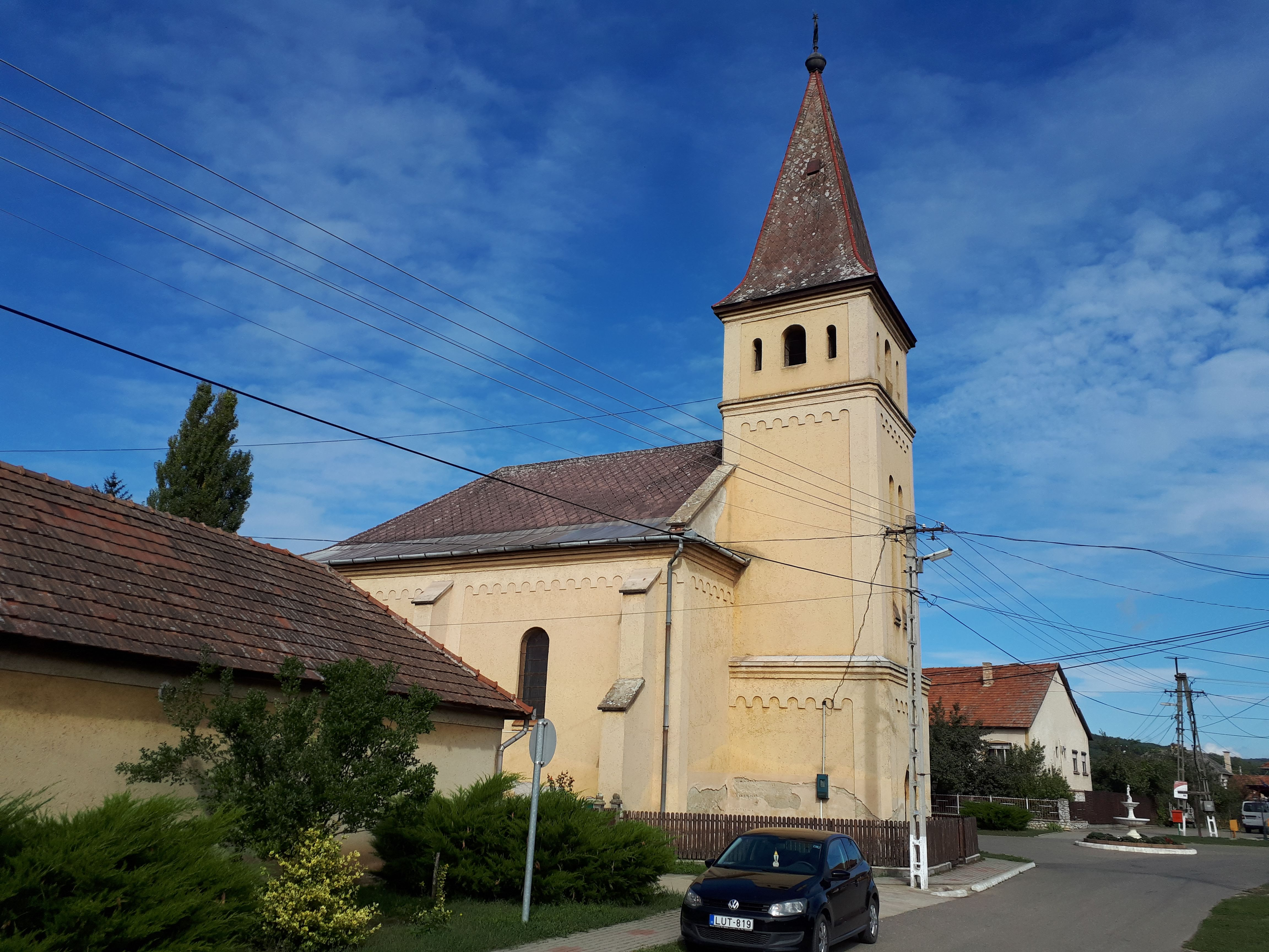 Az 1805-ben épült zilizi református templom